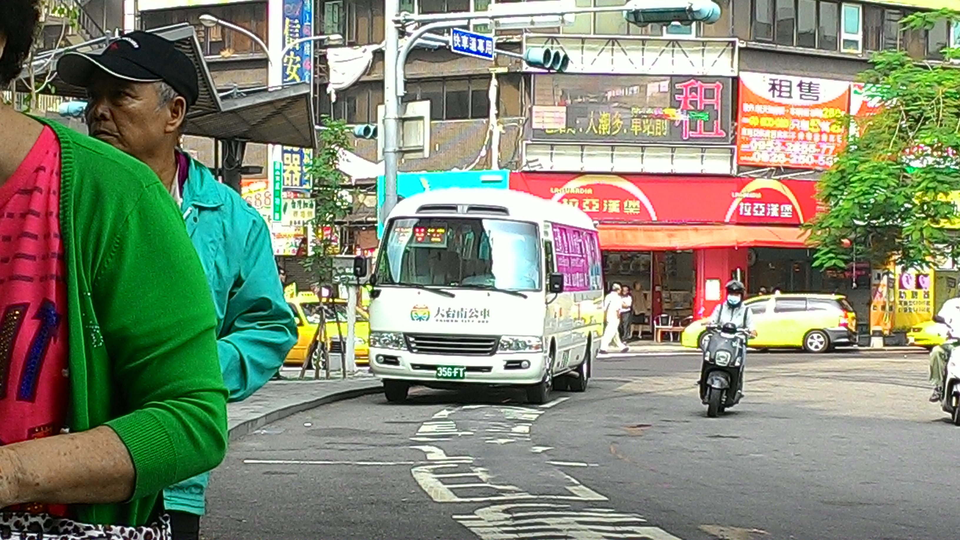 府城客運豐田Coaster中巴356-FT停靠臺南火車站(南站)